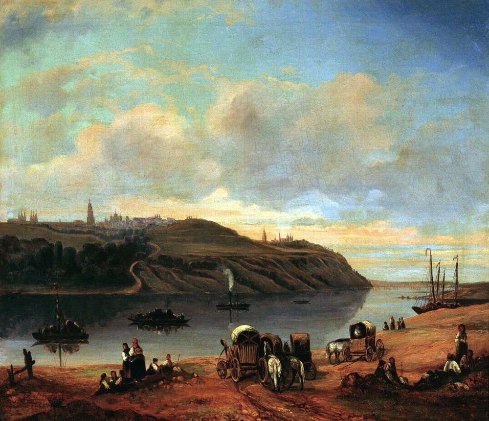 Вид на Київ (40 рр. ХІХ ст.) Автор: М.Сажин: Вид на Київ (40 рр. ХІХ ст.) Автор: М.Сажин